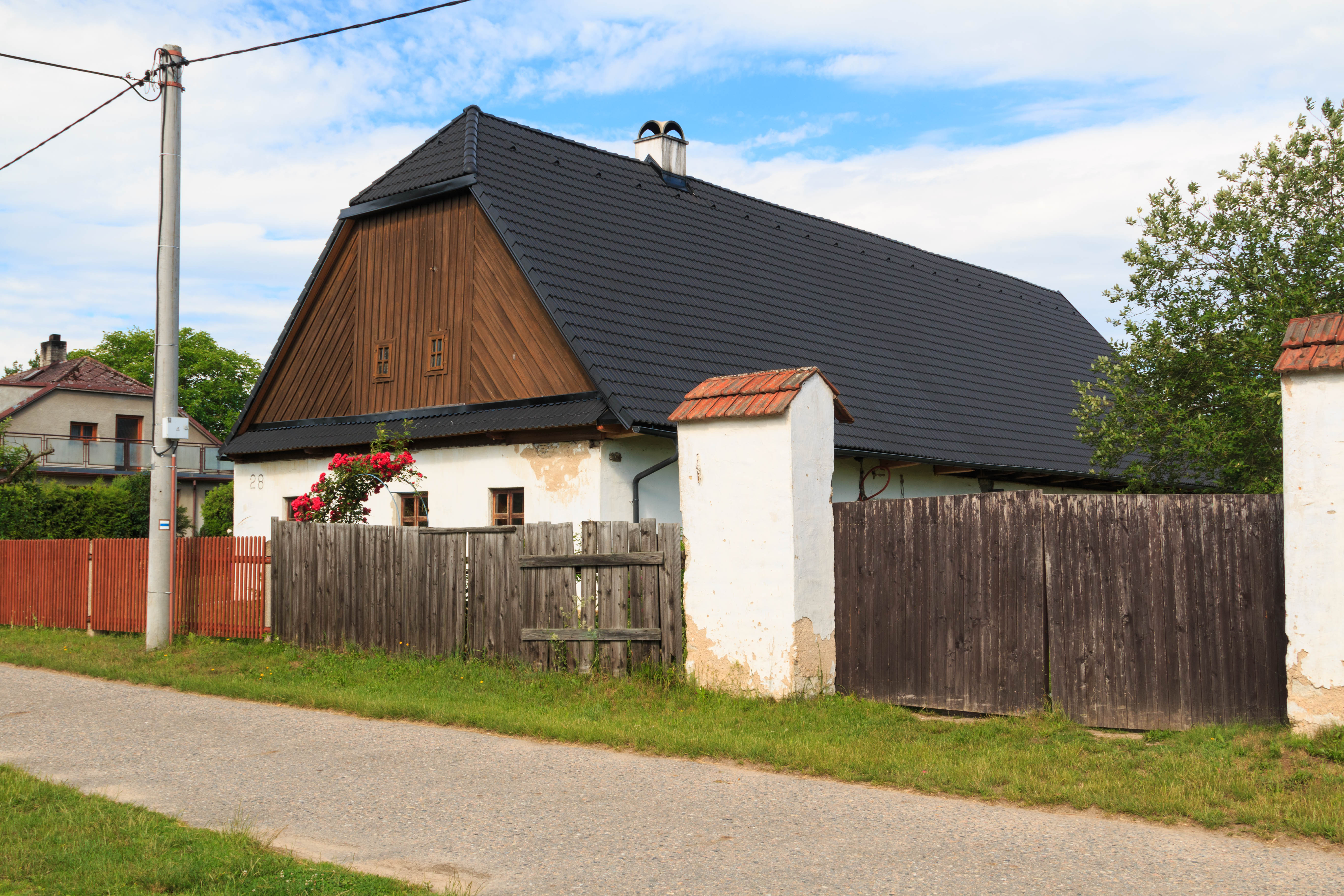 Plchlůvky čp. 3